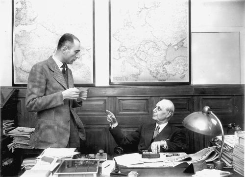 Alla sede del Corriere tra il 1960 e 1970